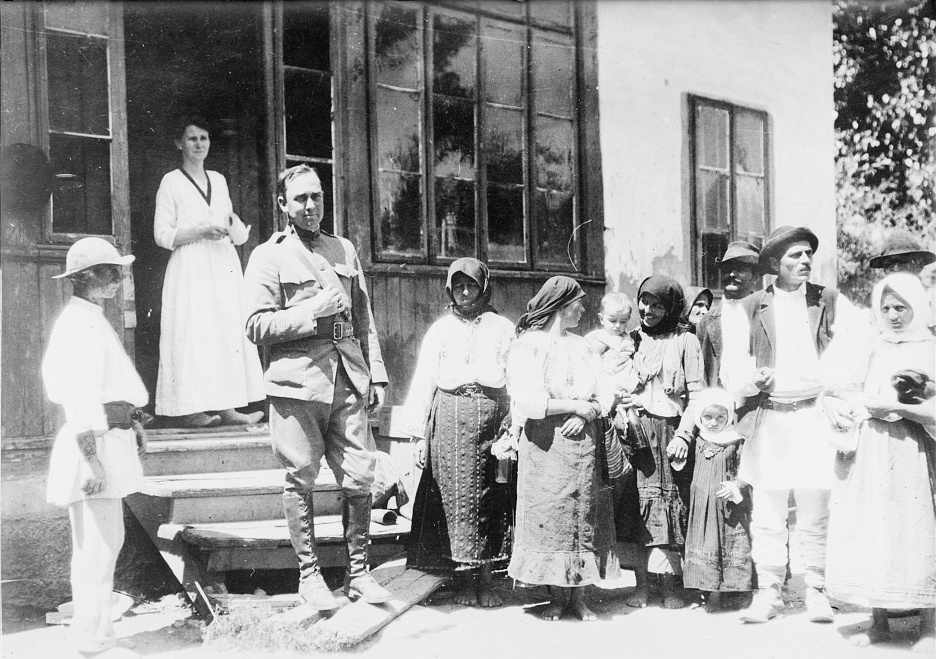 While the Germans still occupied Bucharest a representative of the American Red Cross succeeded in entering the city. He found the hospitals filled with sick and wounded and the civil population in great need of food and clothing. The man who gained entrance to the capitol was Major J.B. Bayne of Washington, D.C., a member of the American mission to Roumania. Major Bayne is the best loved American in Roumania. In the picture he is shown receiving a delegation of peasants who have walked a long distance to his quarters to ask for medical attention.